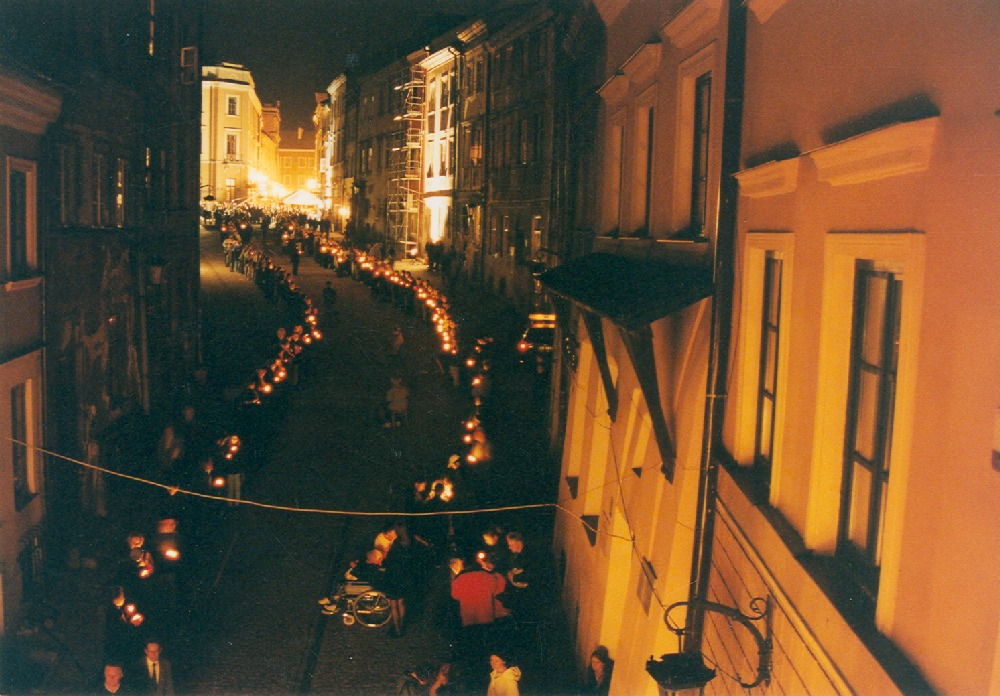 Misterium "Jedna Ziemia - Dwie Świątynie". Widok na ulicę Grodzką, Lublin